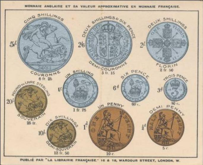 Tableau de conversion entre pièces de monnaies britanniques et valeurs en francs-or (1911), imprimé à Londres par La Librairie française, 16-18 Wardour Street.